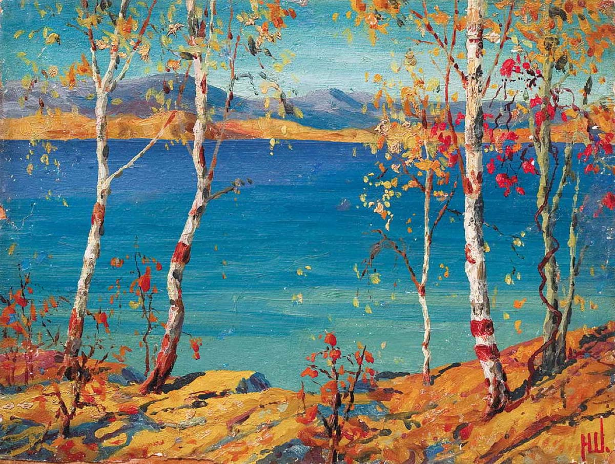 "Берёзки над водой", художник Шлеин Н. П.; картон на дереве, масло; 20х26